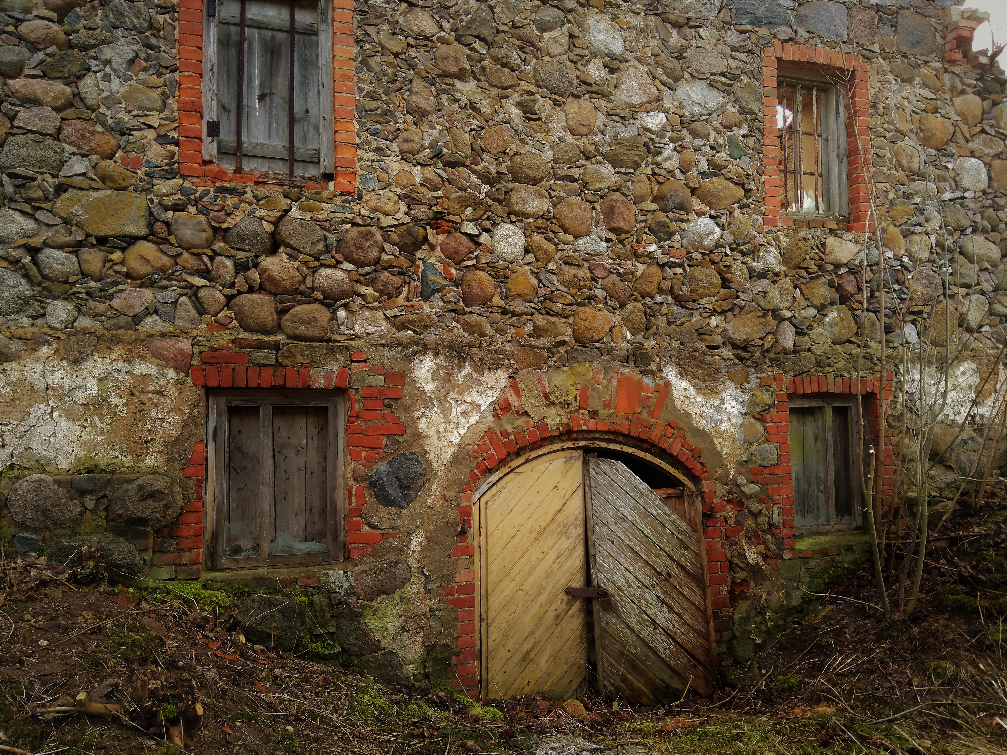 Linnuseala loodenurgas asub mõisaajal ehitatud ait-kelder. Vaade põhjasuunast.